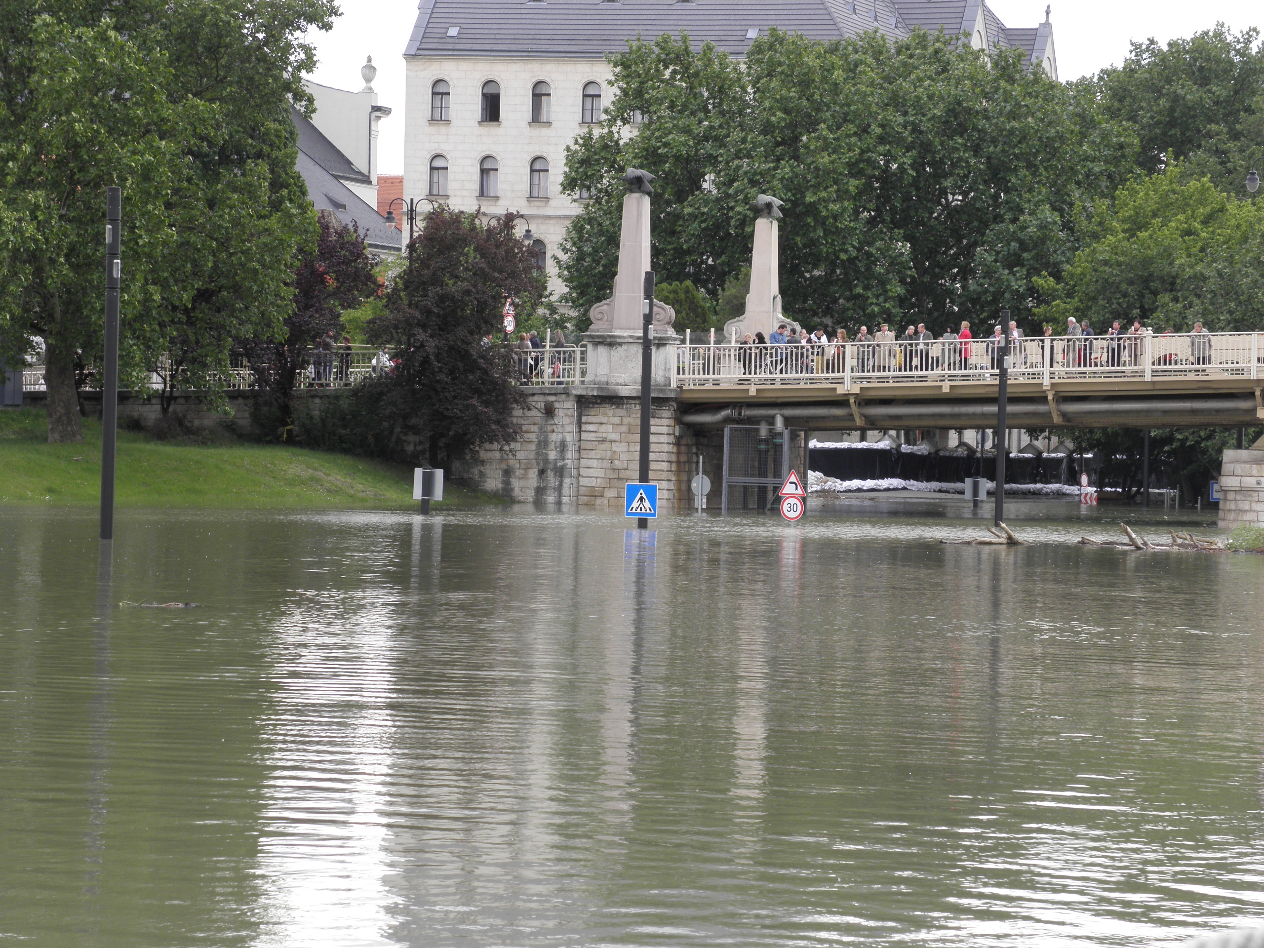 Győr, Móricz Zsigmond rakpart víz alatt